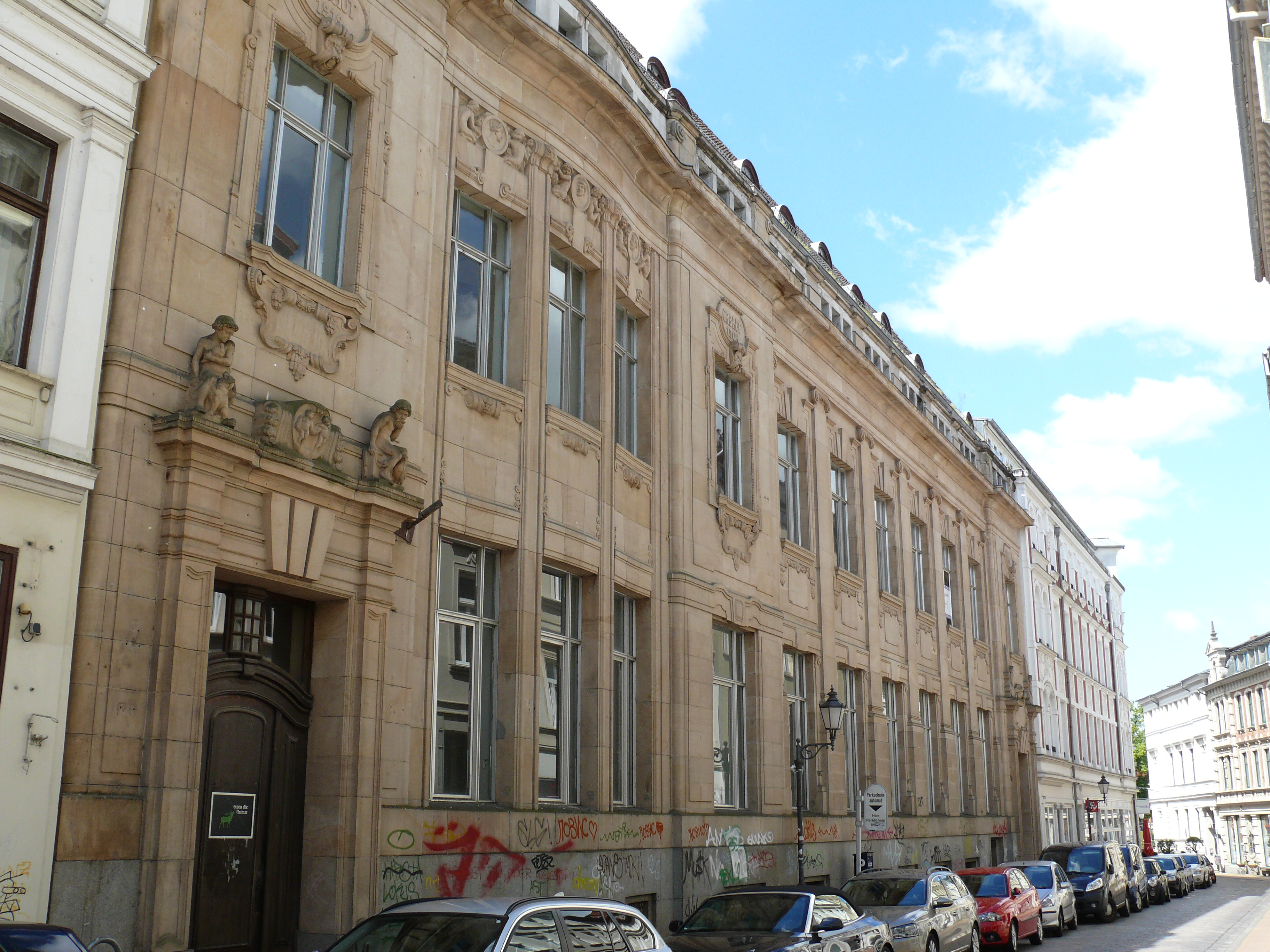 Das Gebäude "Friedrichstraße 5/7" in Schwerin.